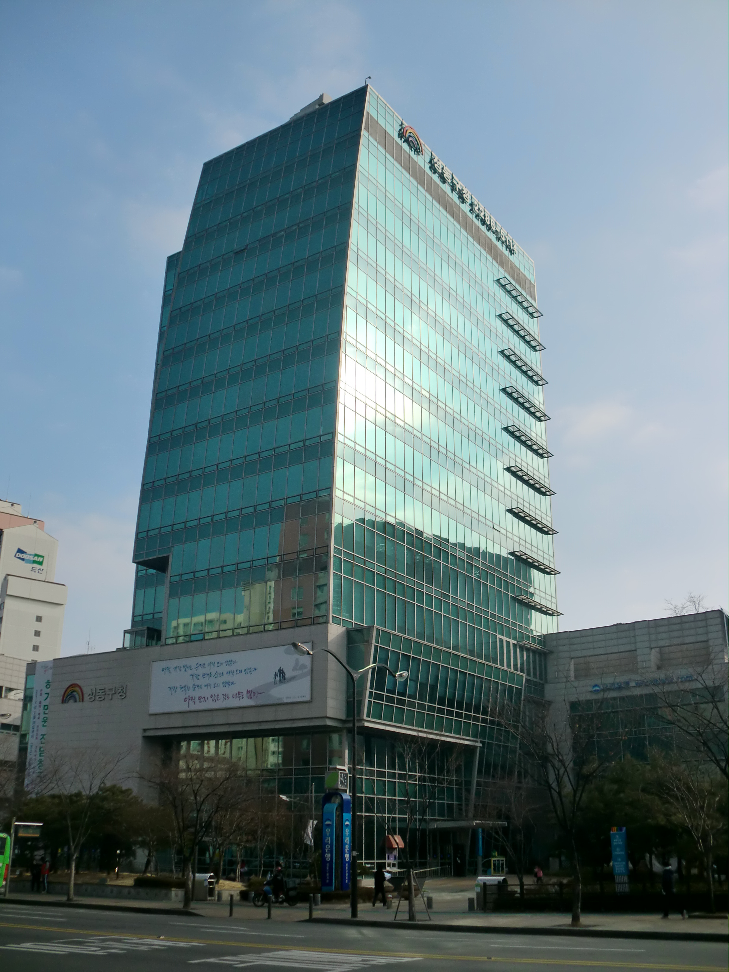 서울특별시 성동구에 있는 성동구청